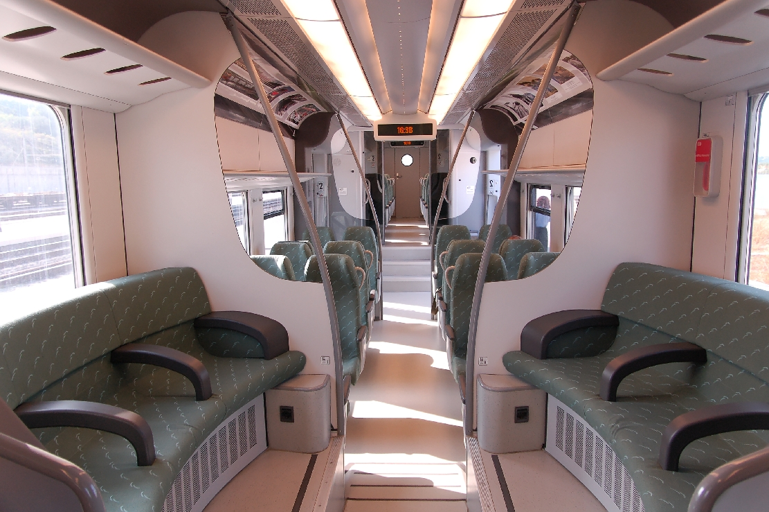 Ferrovia Adriatico Sangritana 2011 in Vasto